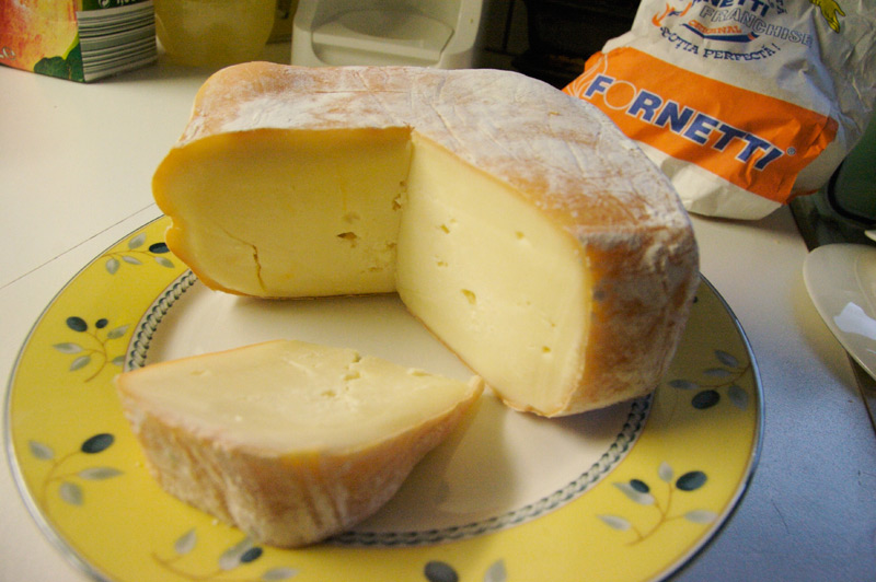 Romanian Nasal cheese.